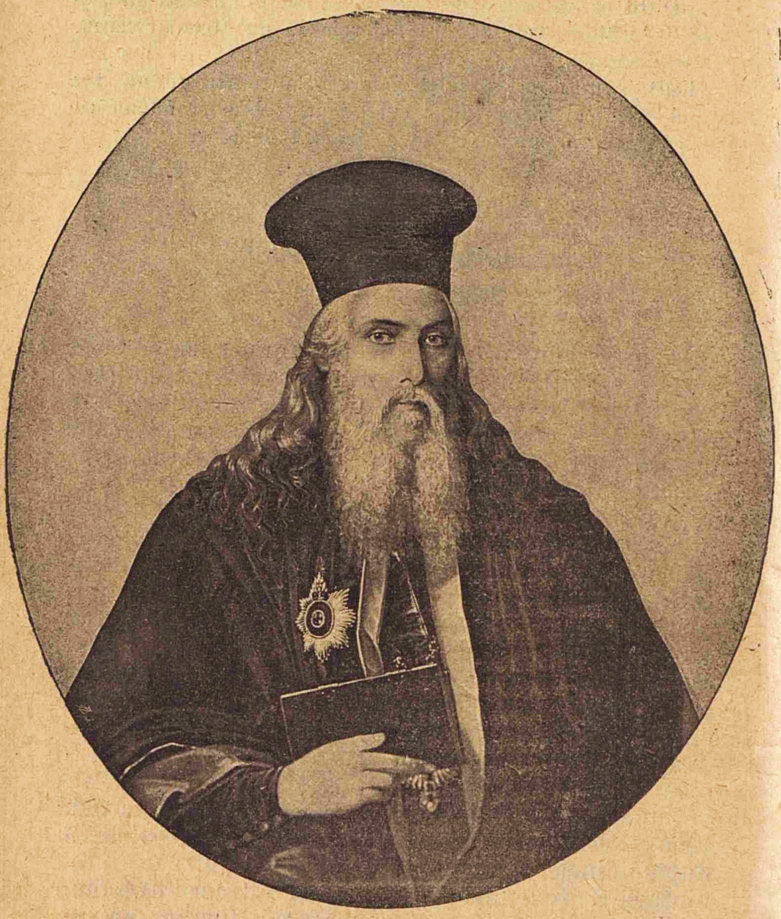 Veniamin Costachi (n. 20 decembrie 1768, Roșiești, județul Vaslui - d. 18 decembrie 1846, mănăstirea Slatina, județul Suceava) a fost un cărturar și traducător român, mitropolit în Moldova.